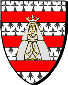 en erminoù e deir dreustell en gwad, e hanterskeudenn Itron-Varia en arc'hant